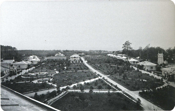 Московское Александровское убежище для увечных и престарелых воинов